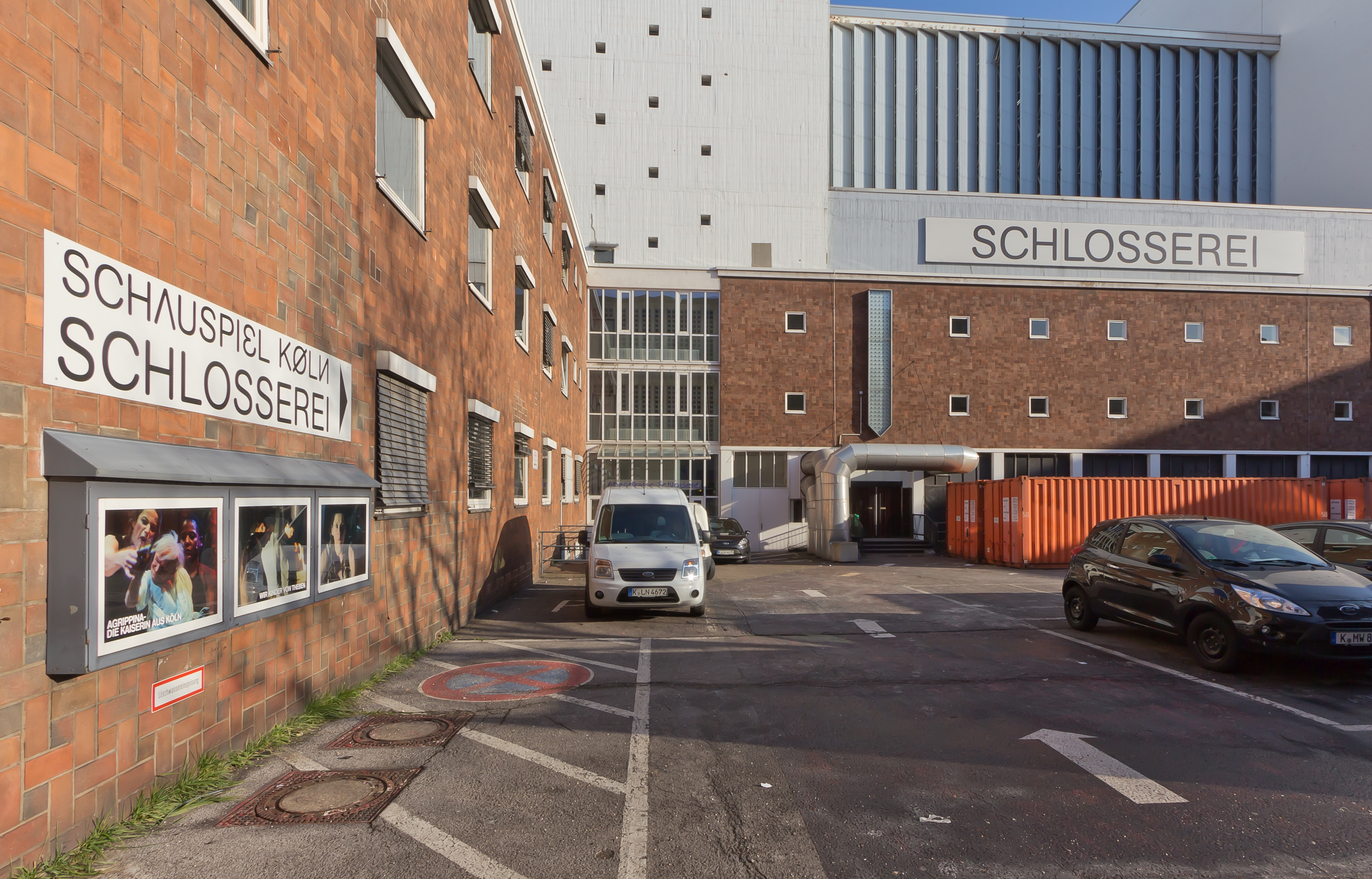 Schauspiel Köln - Eingangsgereich der Spielstätte "Schlosserei" an der Krebsgasse.